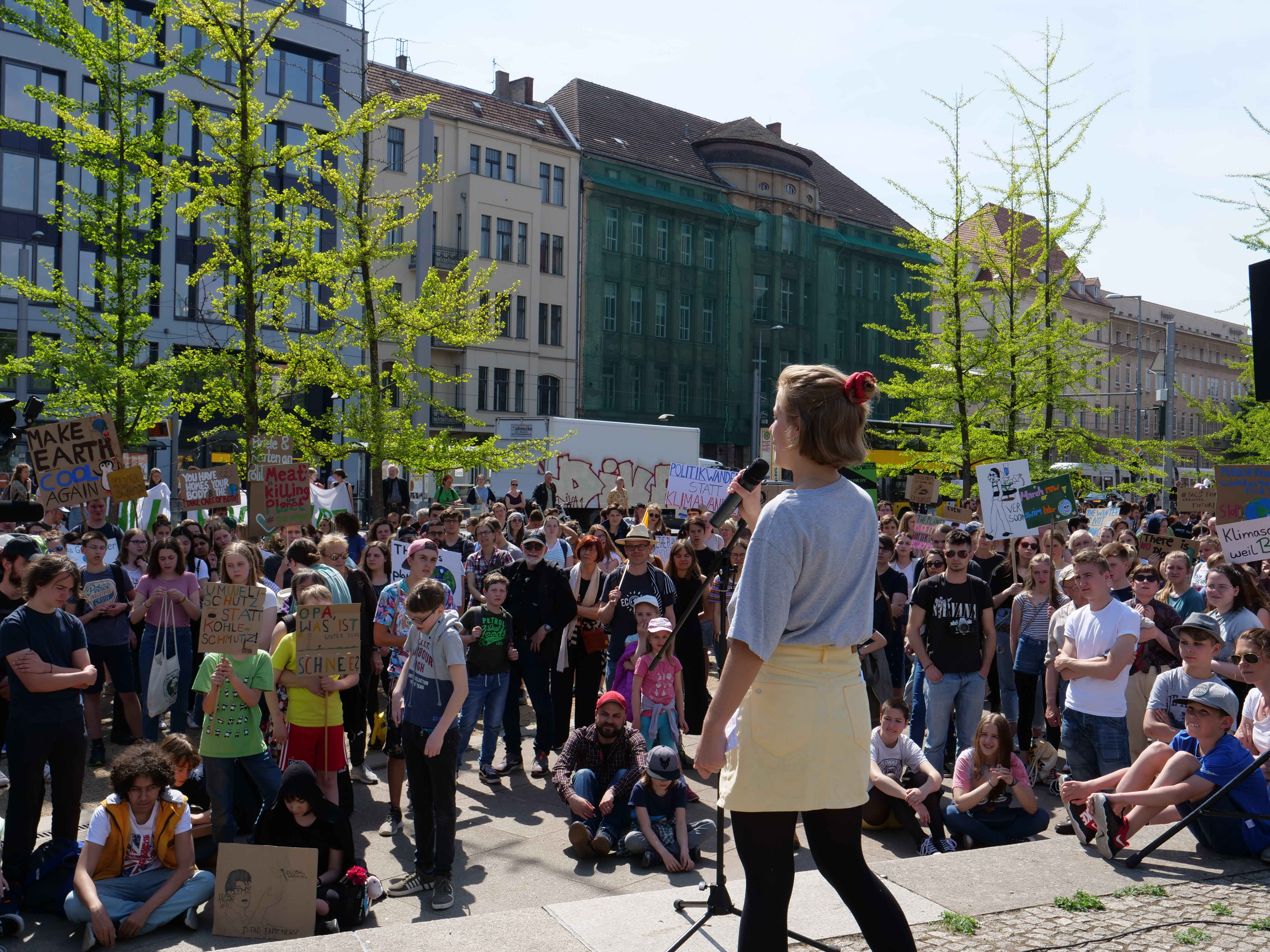 FridaysForFuture Kundgebung im Invalidenpark in Berlin am 26. April 2019.